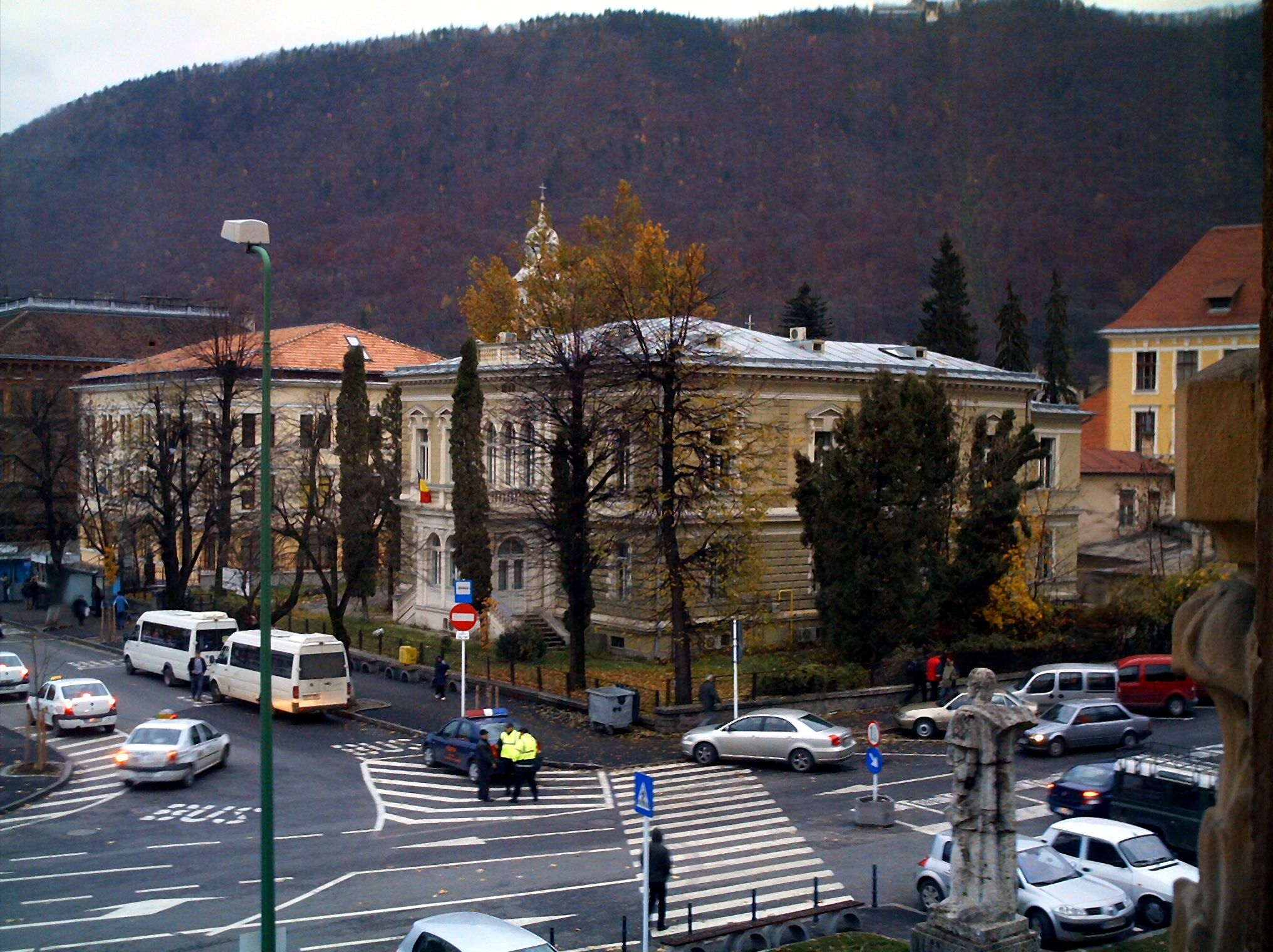 Casa Baiulescu from Braşov